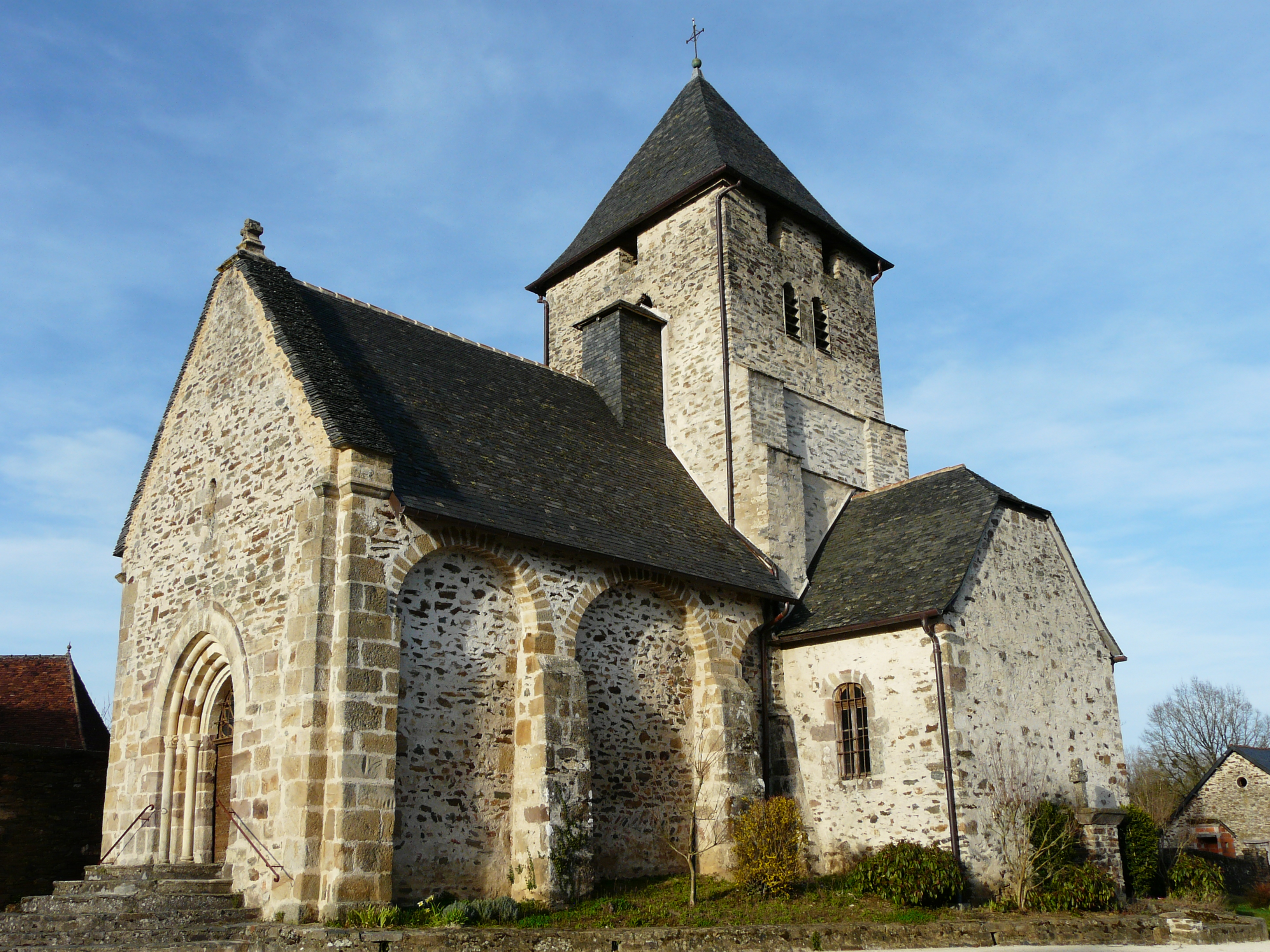 L'église Saint-Cyr et Sainte-Juliette, Saint-Cyr-les-Champagnes, Dordogne, France Object location45° 22′ 42″ N, 1° 17′ 21.7″ E